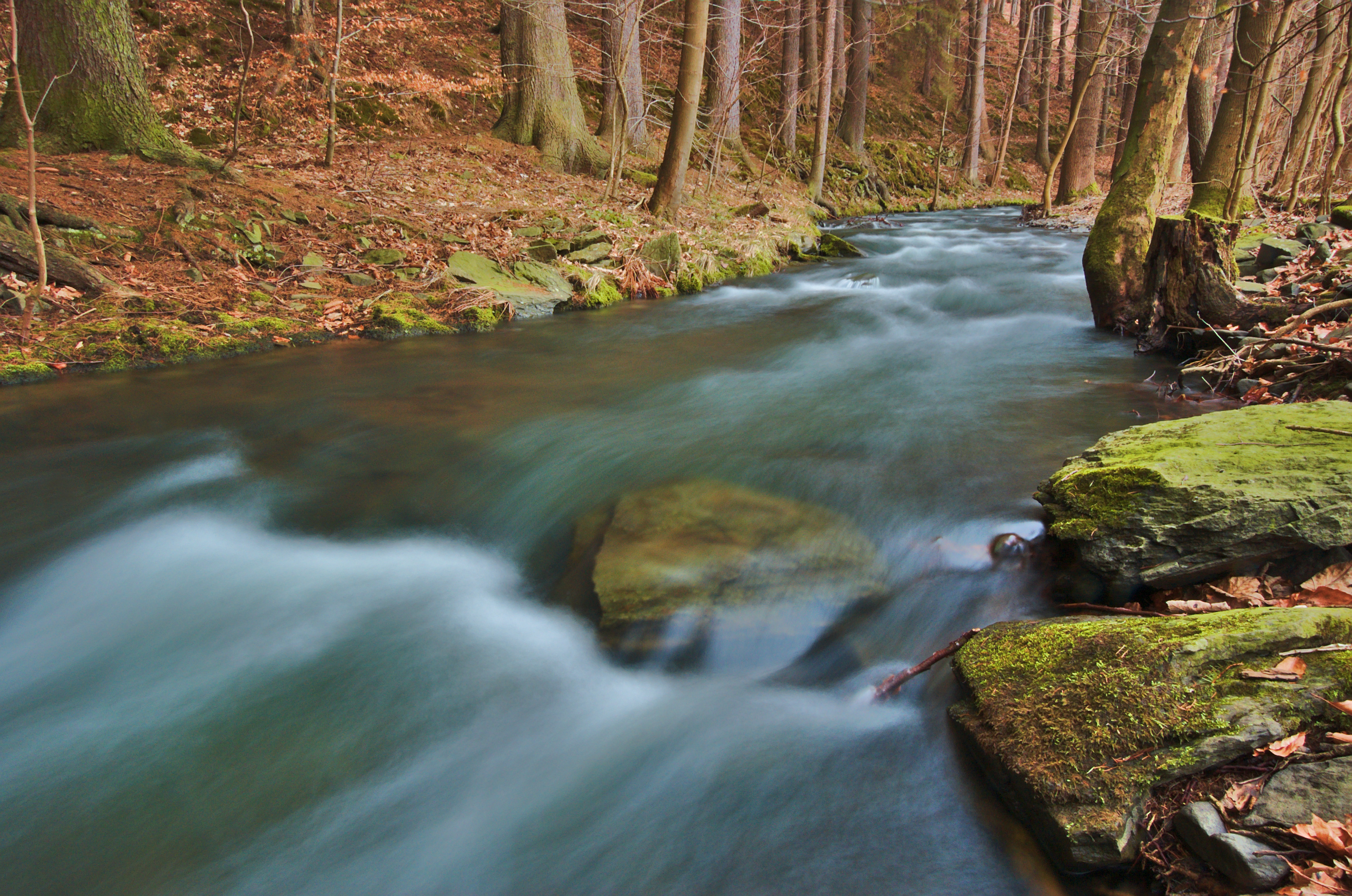 Hloučela u Lipovského mlýna, Lipová, okres Prostějov